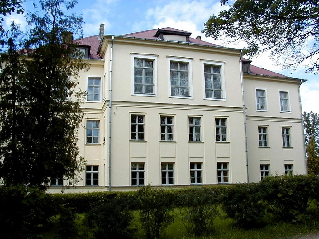 Bērzpils vidusskola 2000-07-28